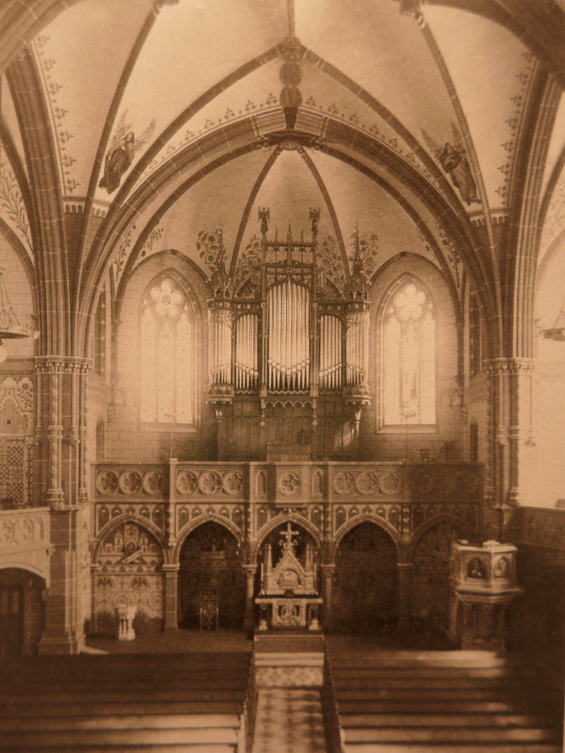 Saarbrücken-St.Johann, Johanneskirche, Innenansicht mit Blick zur Apsis, Vorkriegszustand (Stadtarchiv Saarbrücken)